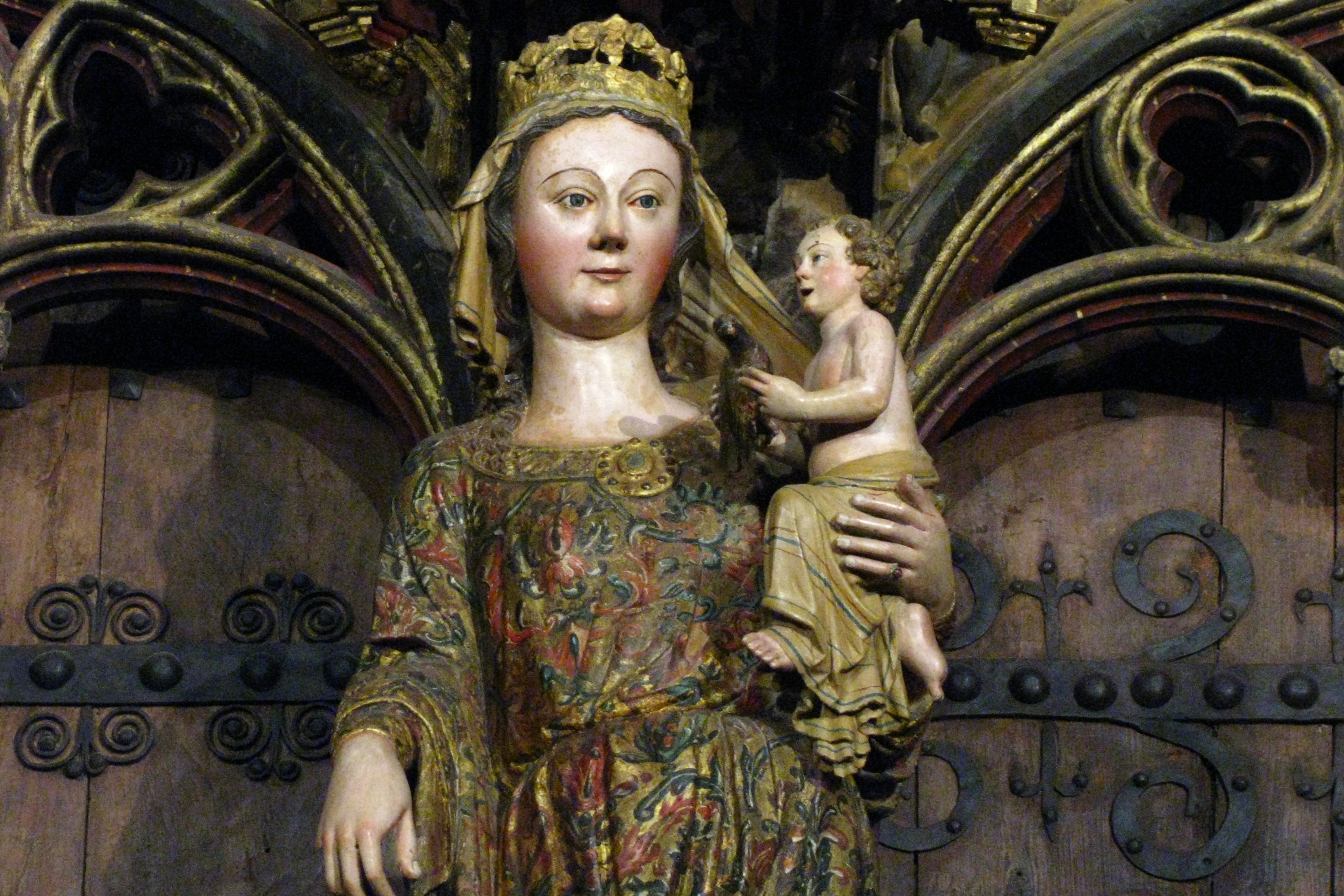 Imagen de la Virgen en el pórtico de la iglesia de Santa María de los Reyes (Laguardia)